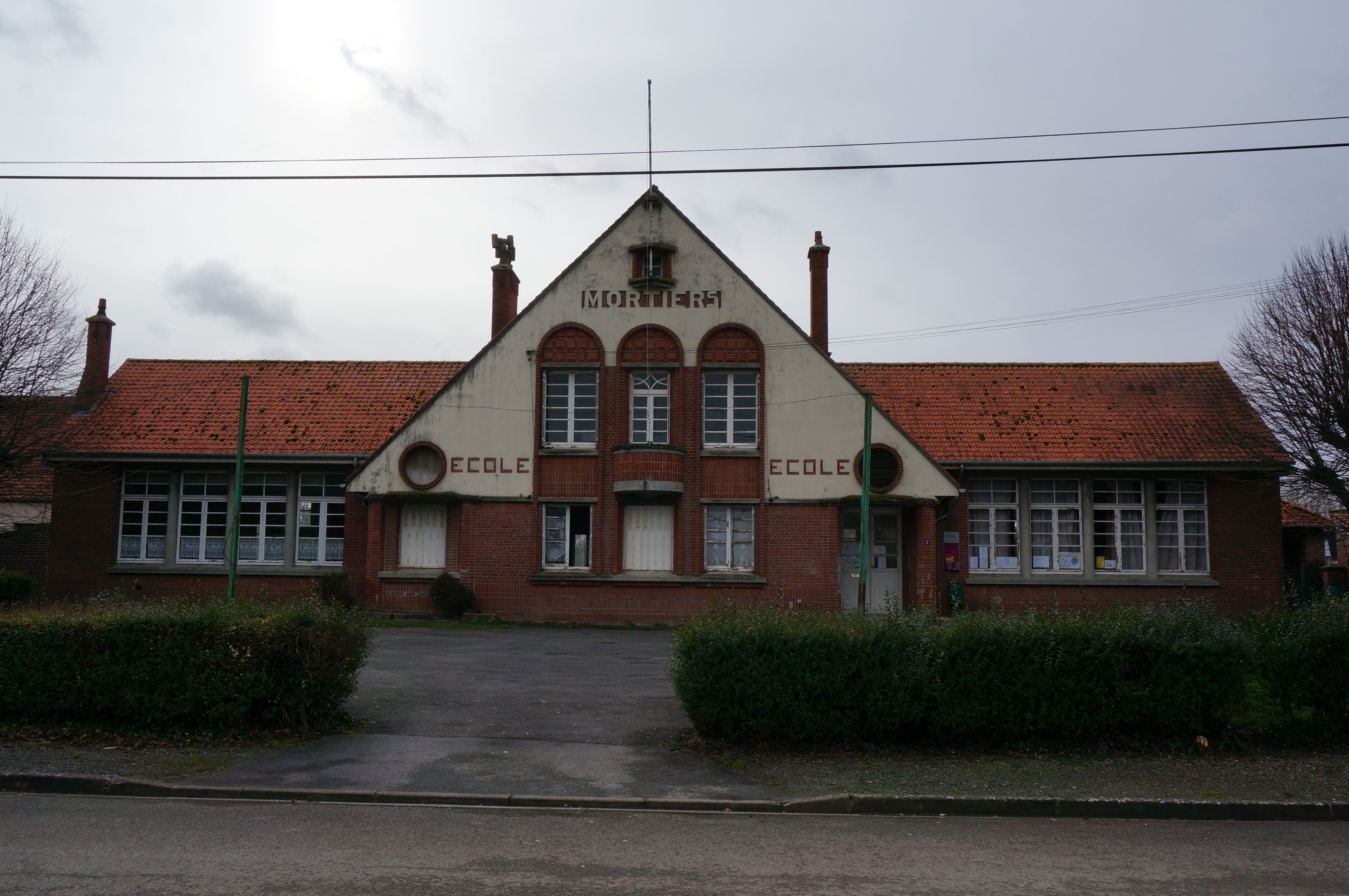 Vue de la commune deMortiers (Aisne).